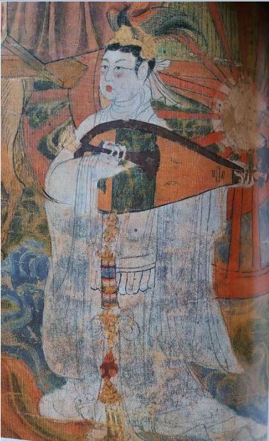 Figura femenina como el planeta Venus de la pintura "Buda Tejaprabhā y los Cinco Planetas" (熾盛光佛並五星圖), se representa como una hermosa señora tocando la pipa (琵琶). Su tono de piel es blanco como la nieve. Por cierto que era parte de la estética femenina que fue trasladado a Japón y emulada por las Geishas.